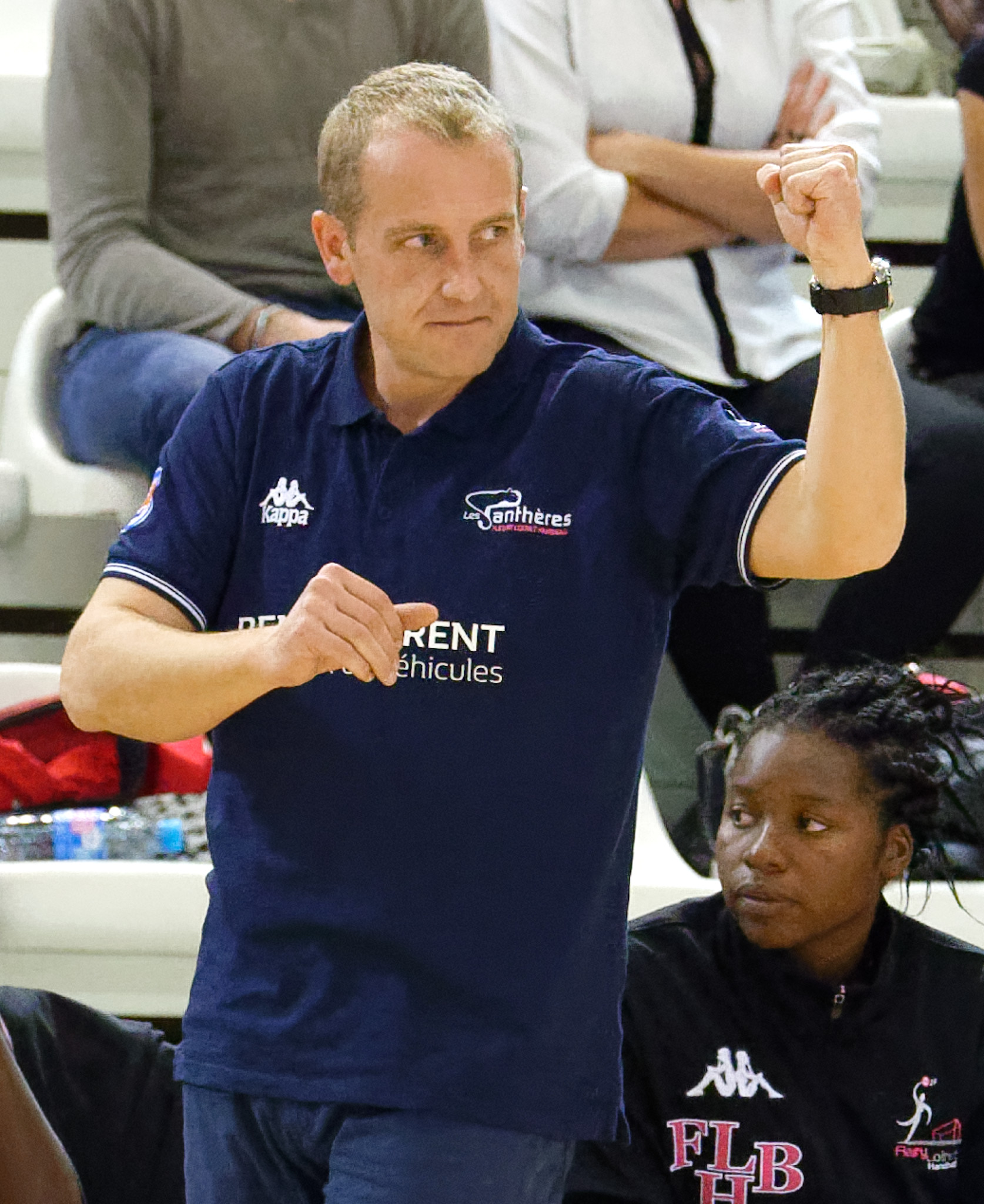 Rencontre de championnat entre Issy Paris Hand et fleury. A Issy Les Moulineaux, le 22 septembre 2015